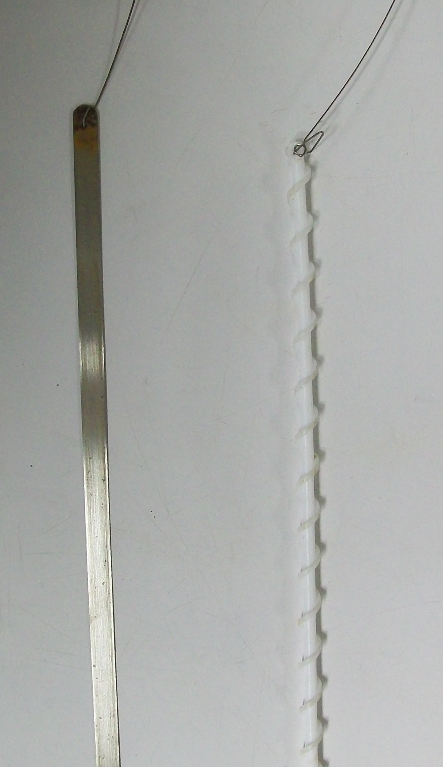 bande métallique (à gauche) et hélice en téflon (à droite) pour une colonne à distiller à bande tournante, en usage à l'ENS de Lyon (France)